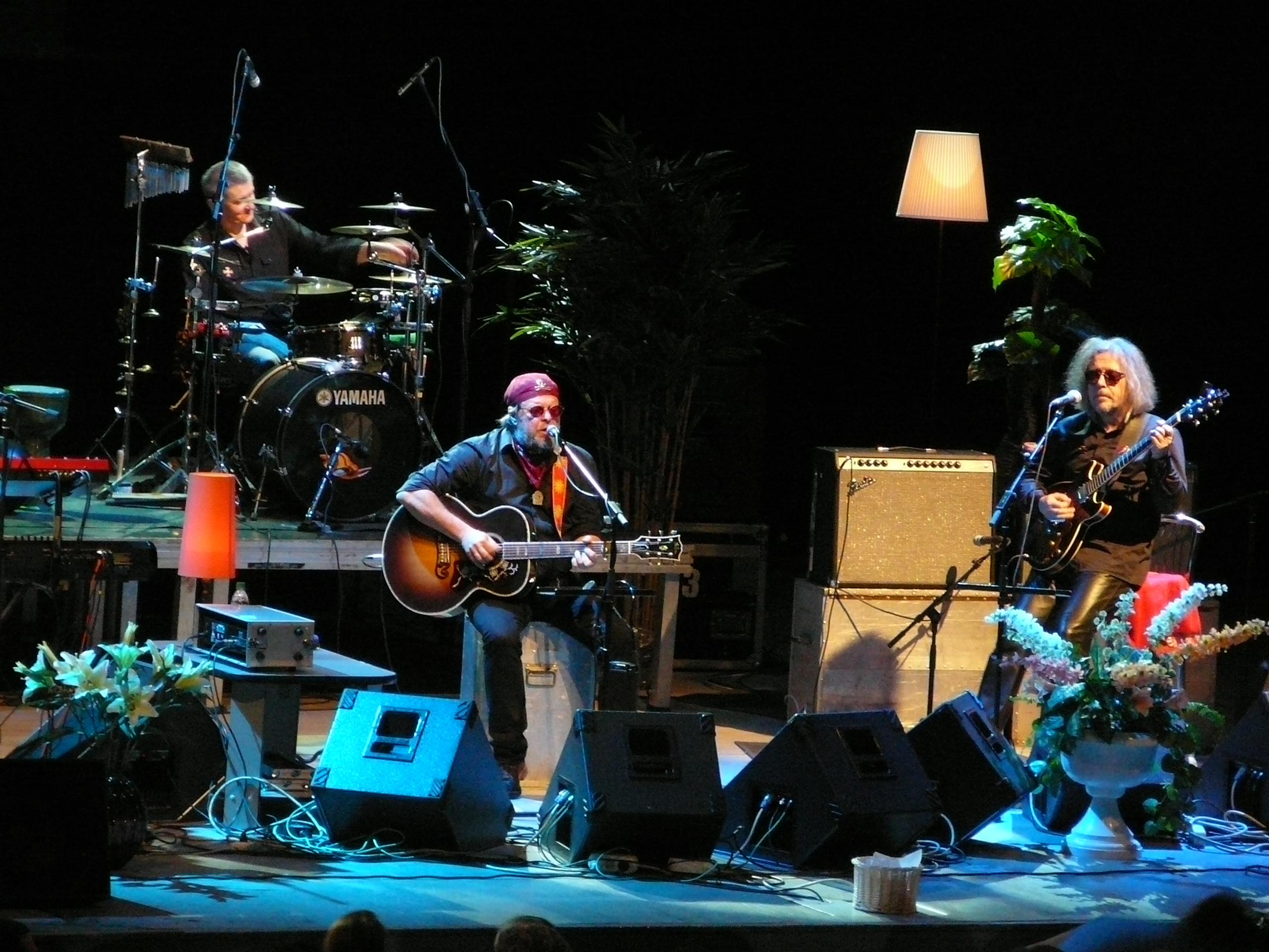 Выступление Б. Б. Гребенщикова на «Домашнем концерте» в городе Казани (КСК «УНИКС») 2 апреля 2013 г.